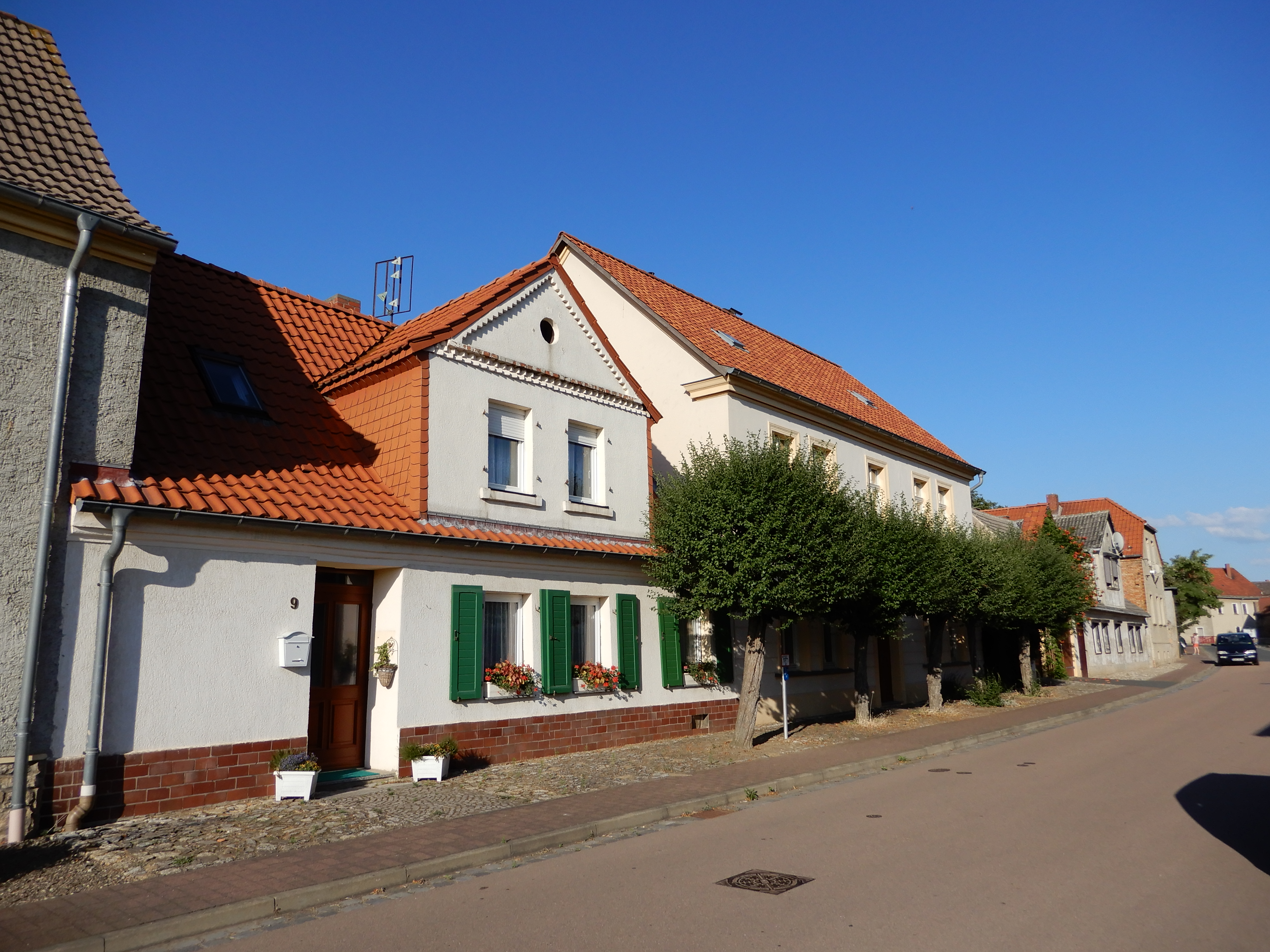 Gatersleben, Schmiedestraße 9-10